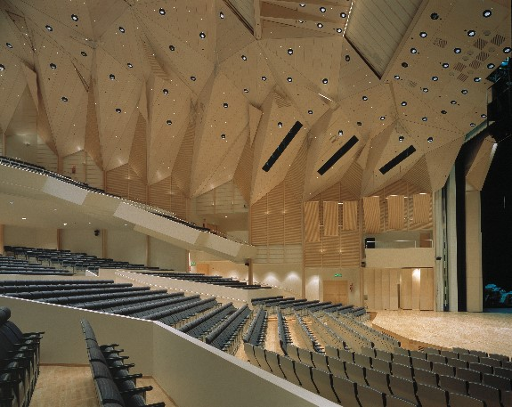 Tampere-talo Iso sali